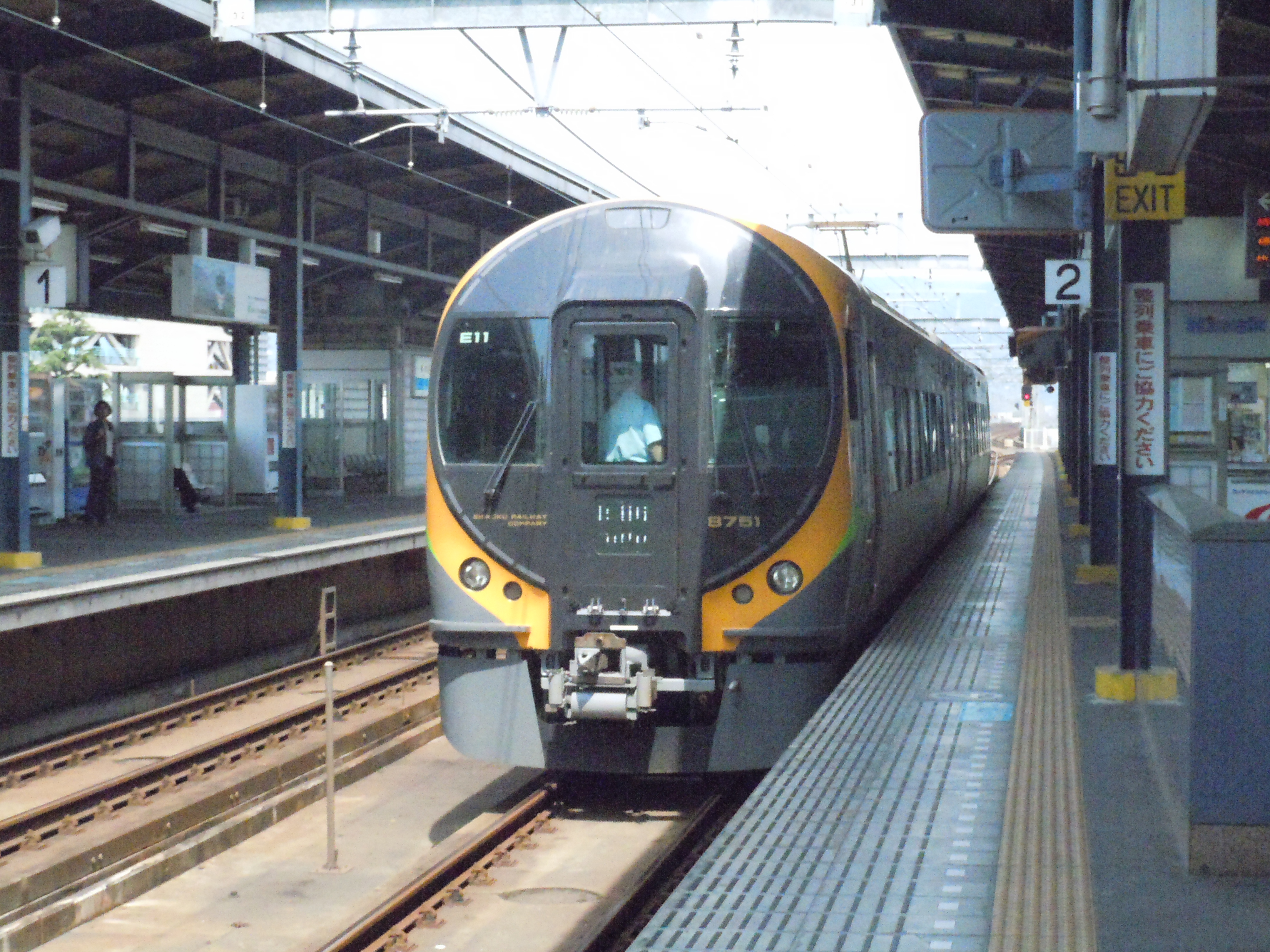 坂出～多度津間で試運転中の8600系(ﾏﾂE11編成)。 2014年5月24日 坂出にて